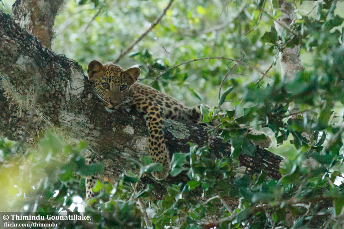 Sri Lankan Leopard Cub